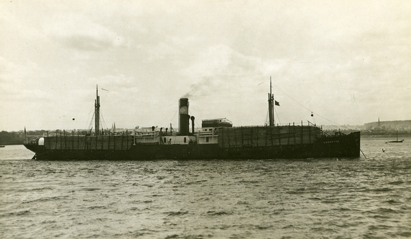 D/S Breiviken (Ex. Kronstad) (b. 1911, W. Dobson & Co., Newcastle)